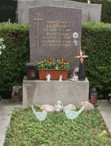 Karl Fian-Liesinger Friedhof (93-8-11)